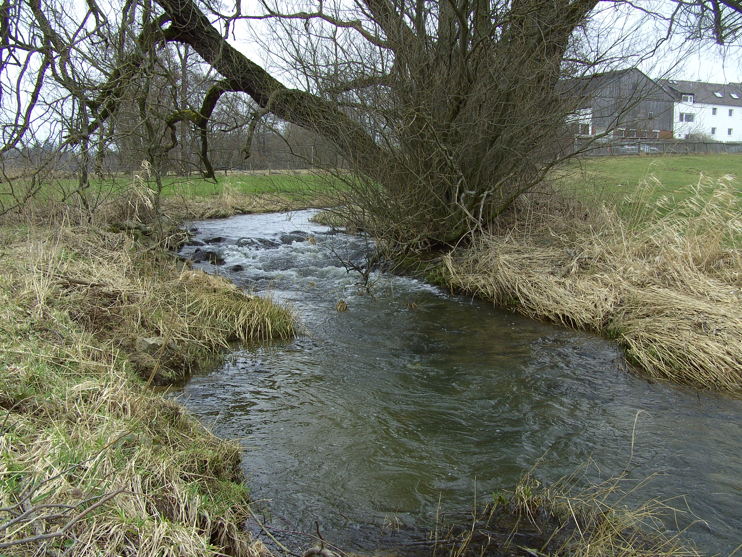 Die Nördliche Regnitz kurz vor ihrer Mündung in die Saale